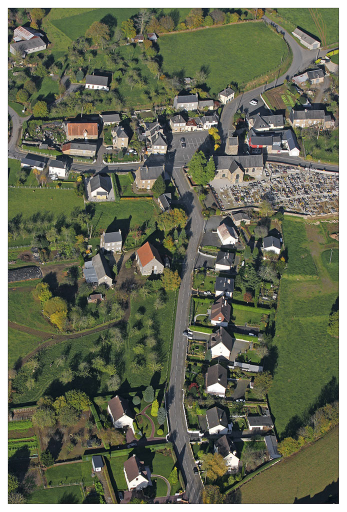 Vue aerienne Romagny, Manche, Normandie, France, Europe.